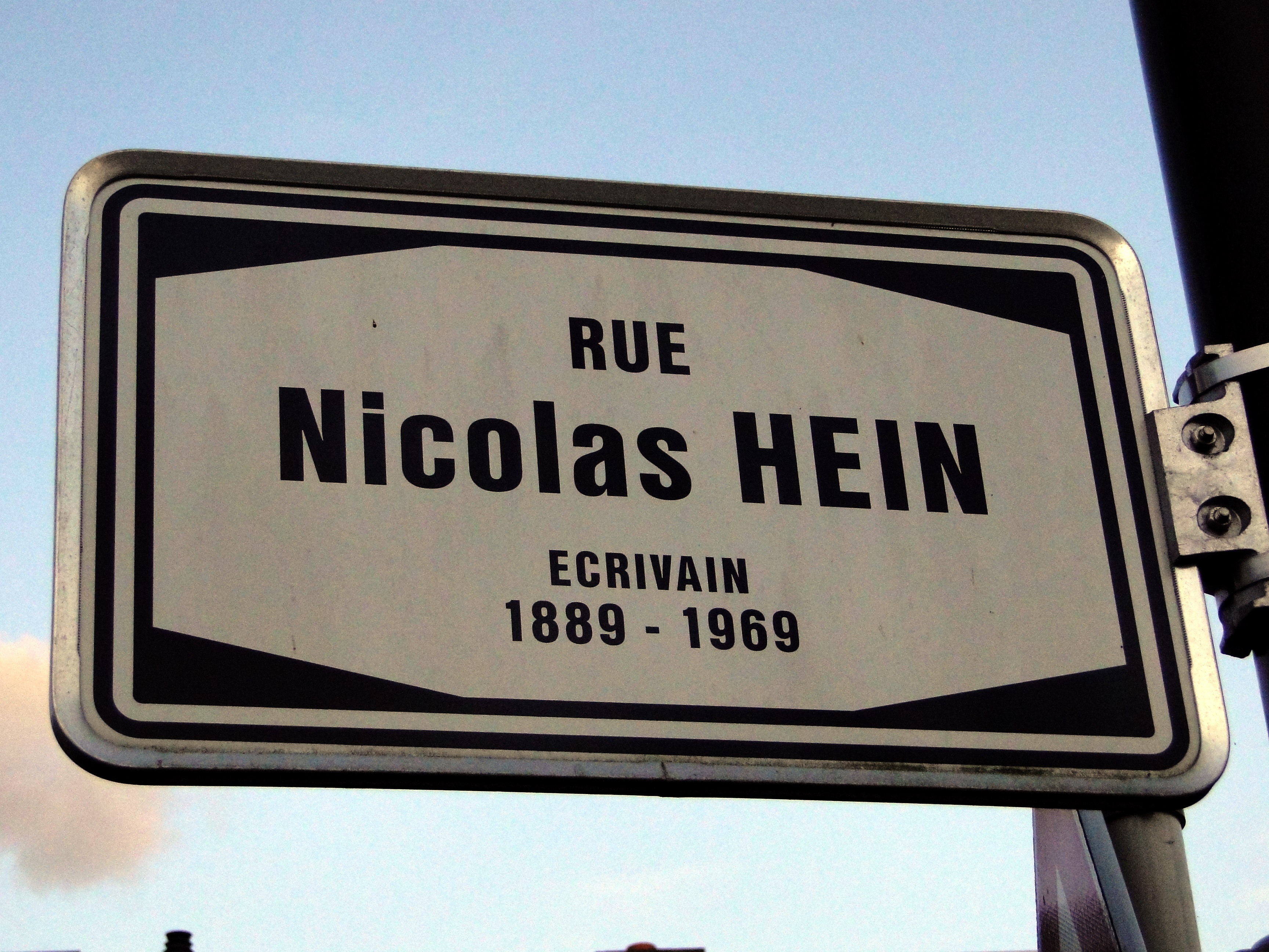 Stroosseschëld an der Stad Lëtzebuerg